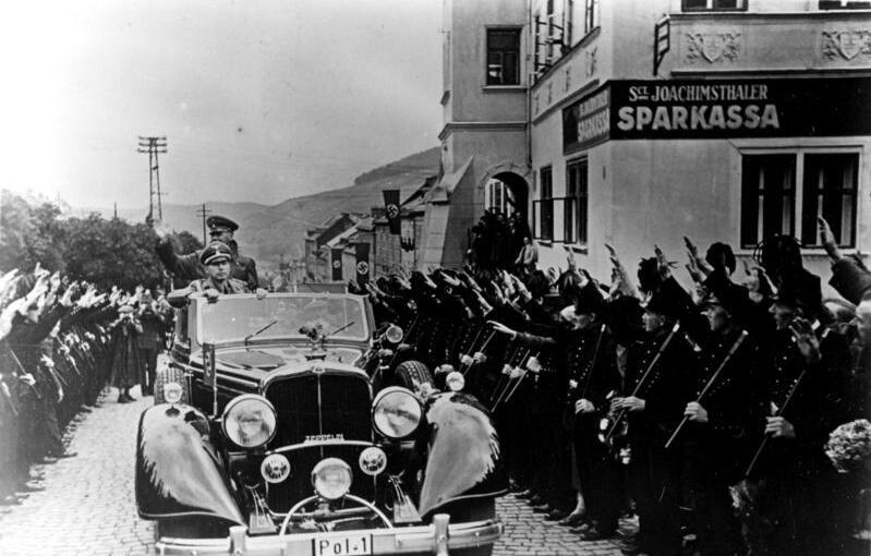 Staatsbesuch des Reichs- und Preußischen Ministers des Innern Dr. Wilhelm Frick in Sudetenland